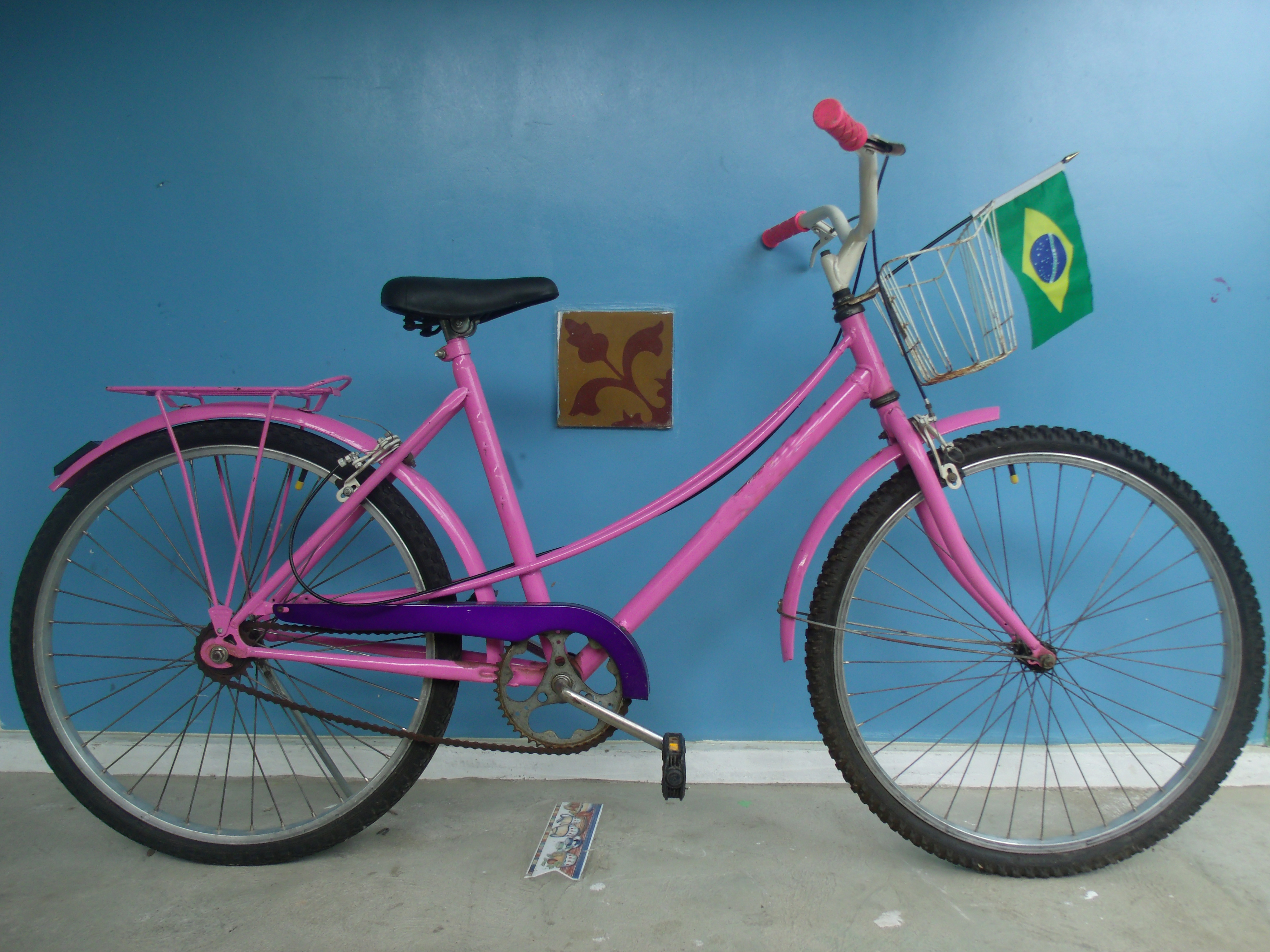 Bicicleta feminina brasileira, marca Caloi ceci plus 1996. Trata-se de uma bicicleta já sem as feições originais.